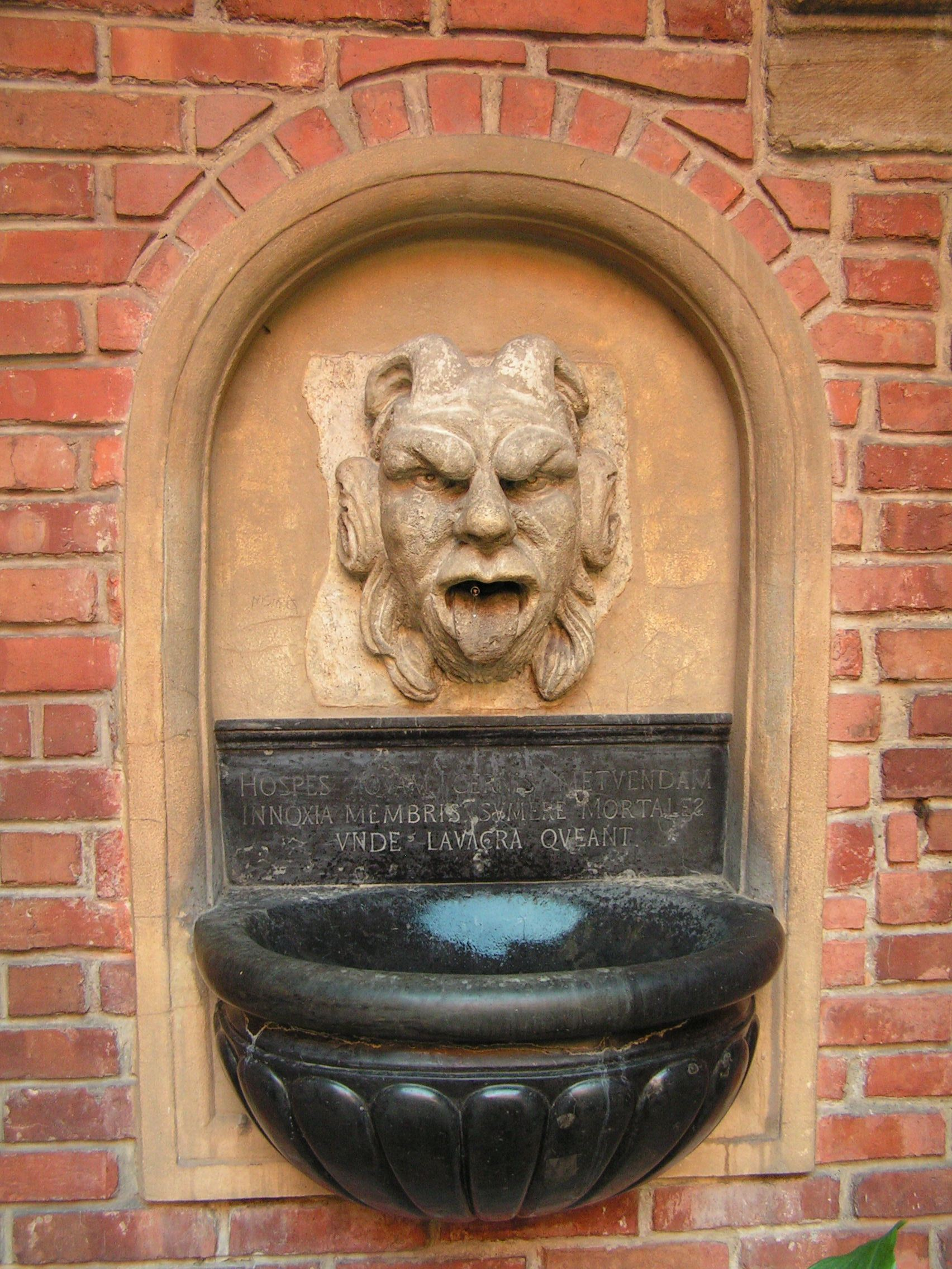 Reliefs in Collegium Maius, Kraków